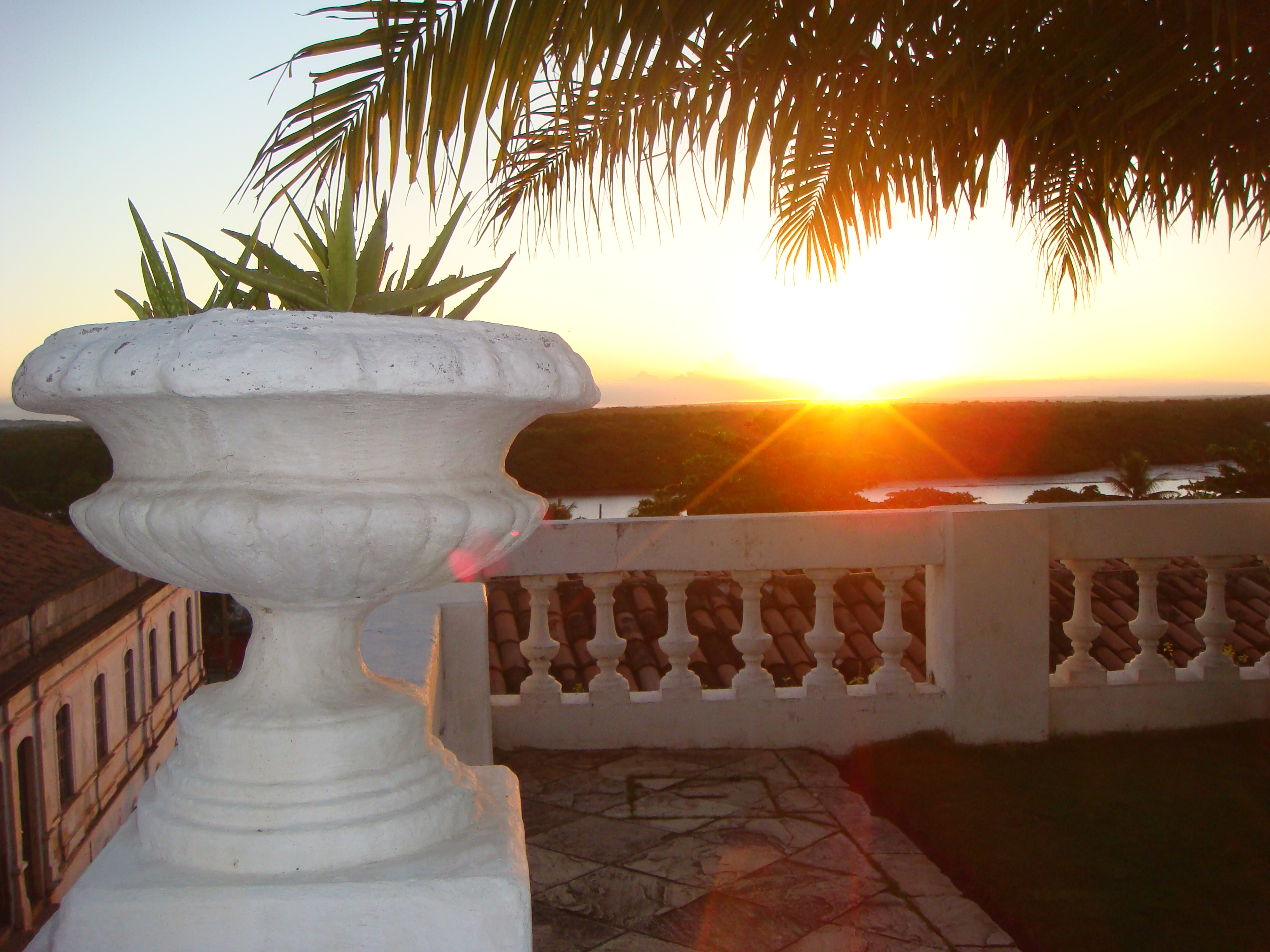 Pôr-do-sol - Hotel Globo